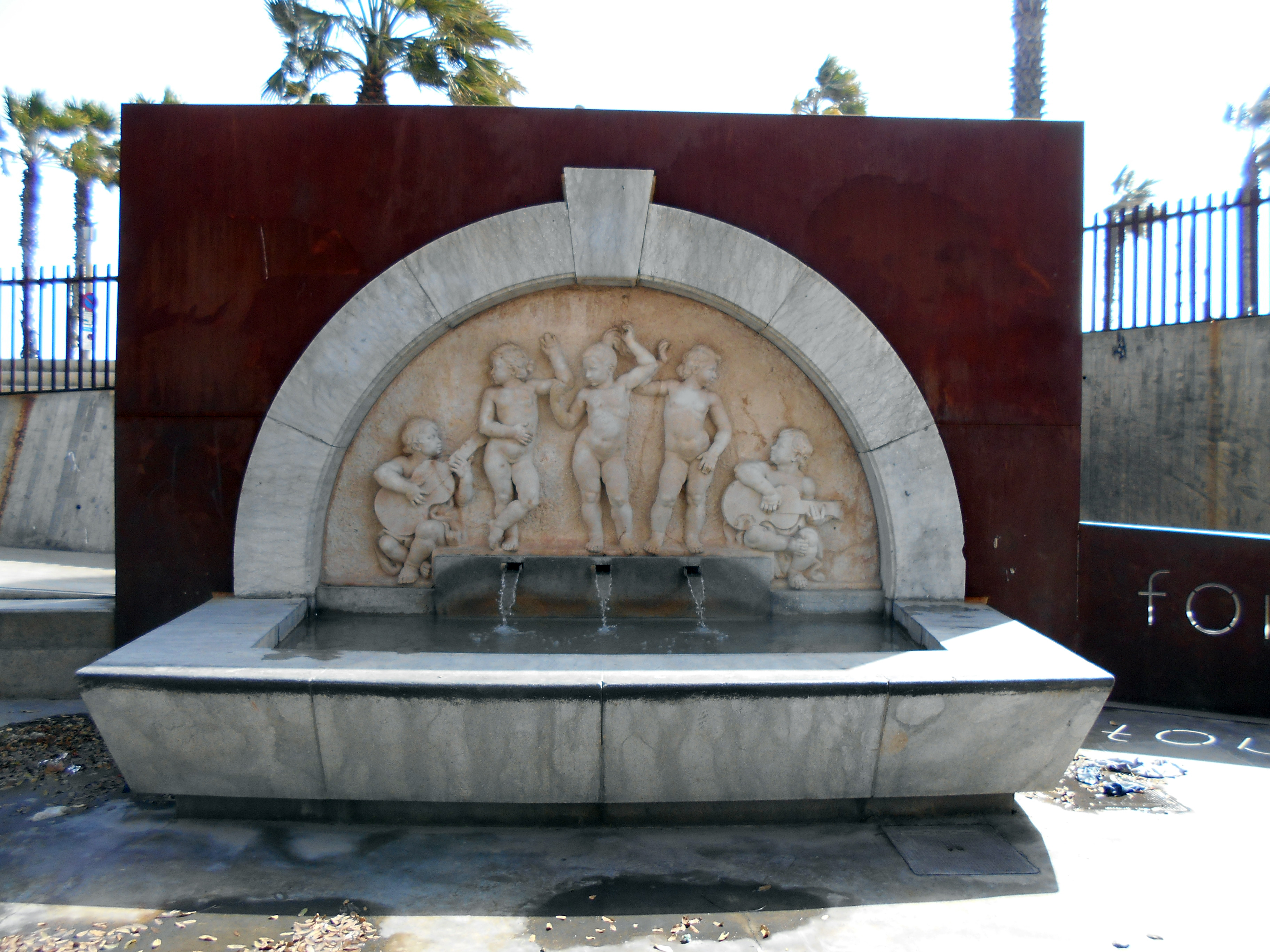 Fuente de Carmen Amaya (Rafael Solanich).